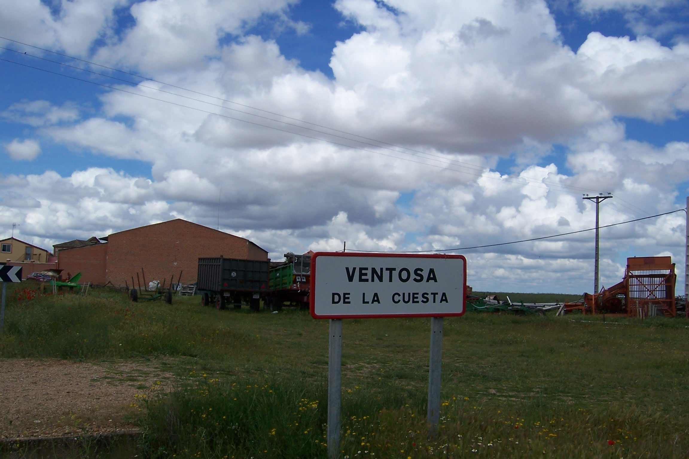 Ventosa de la Cuesta (Valladolid, España). Cartel de Obras Públicas indicando el municipio.